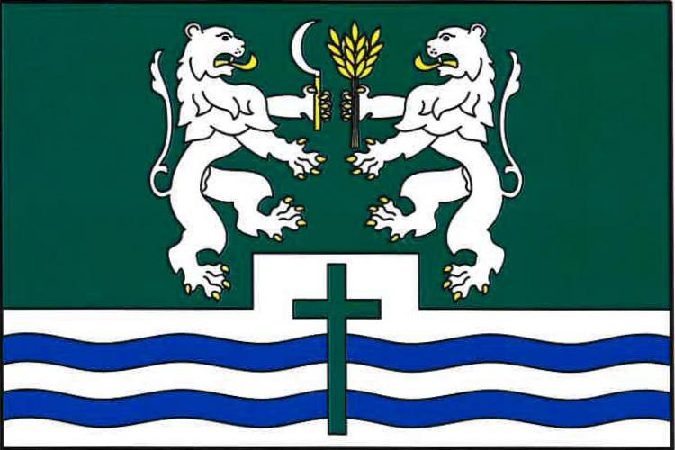 Prosíčka HB vlajka